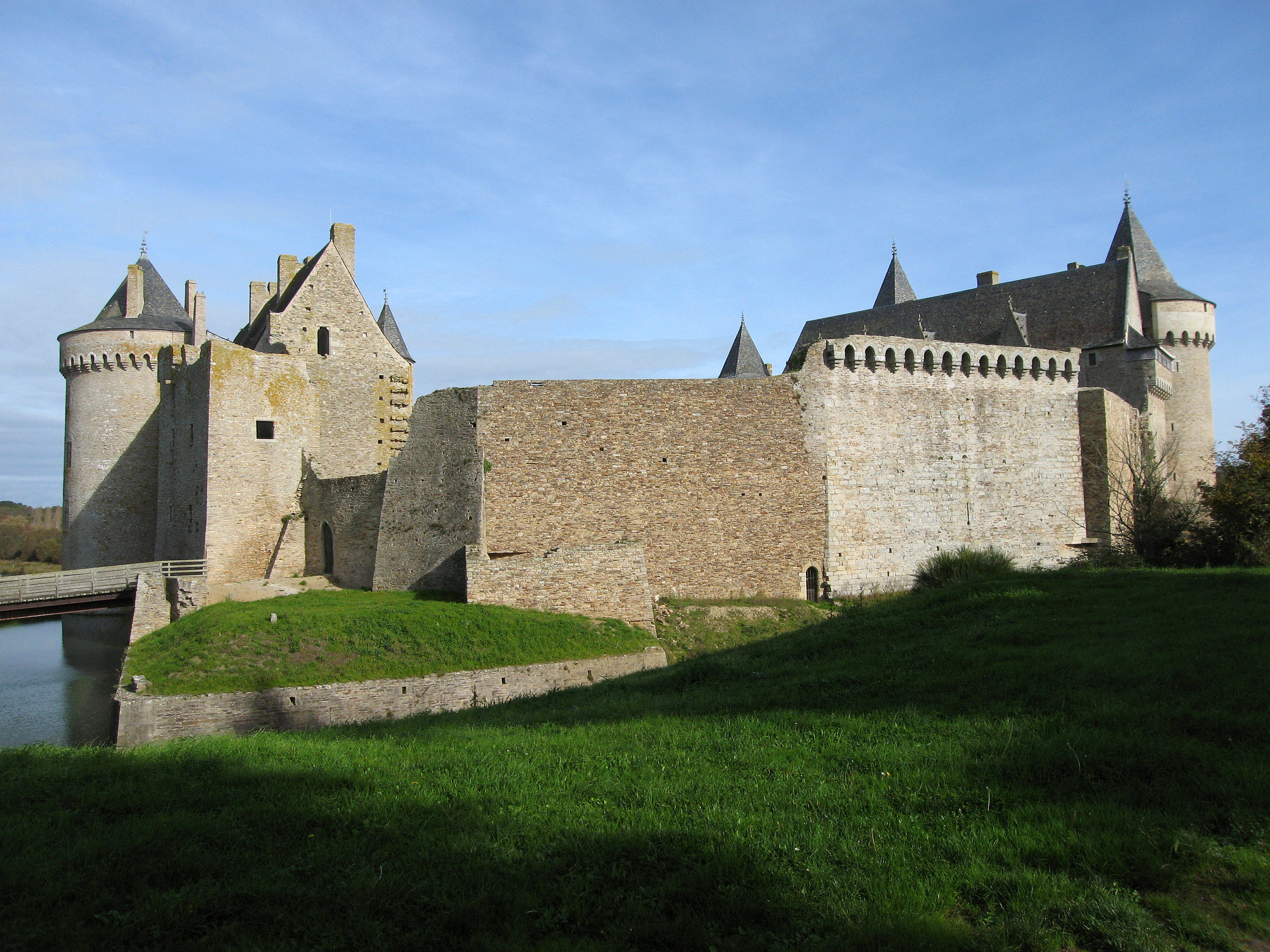 Chateau de Suscinio, Sarzeau, Morbihan, France.